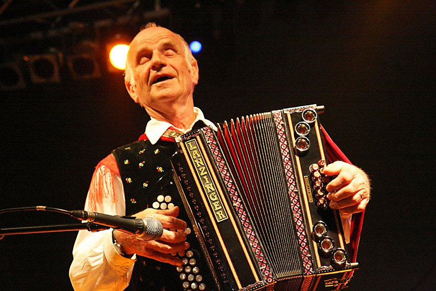 Lojze Slak, slovenski glasbenik / Slovene musician